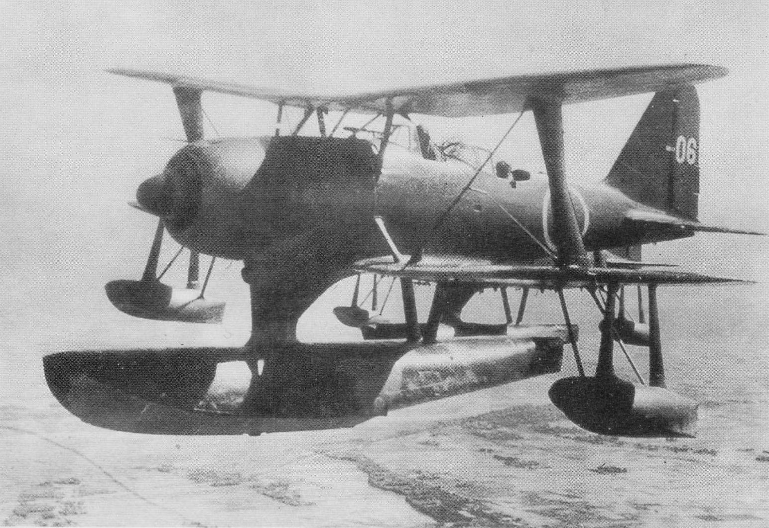 Mitsubishi F1M "Pete", idroricognitore marittimo a galleggiante centrale, monomotore biplano, data e luogo della scatto imprecisati.